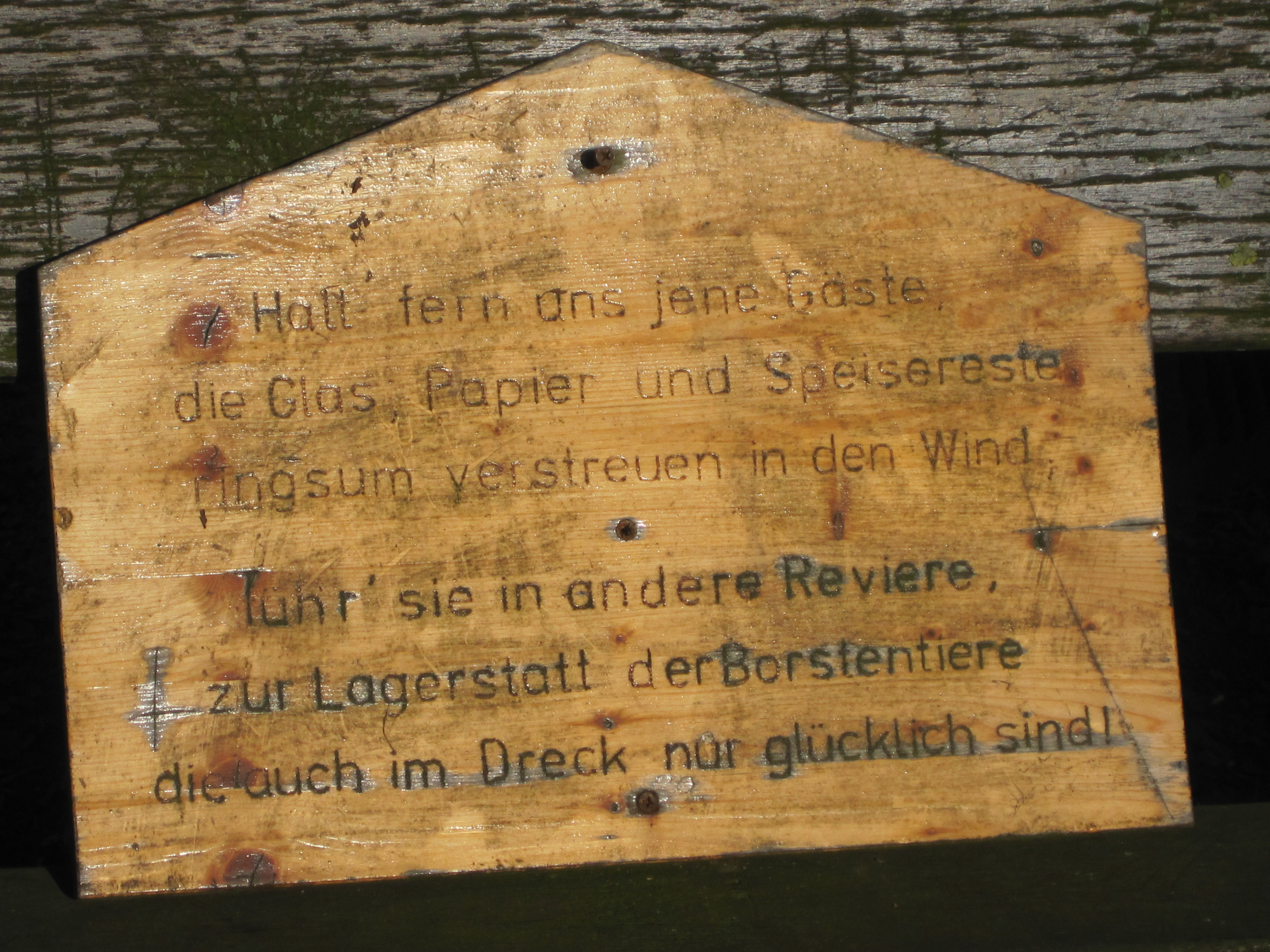 Das Foto zeigt ein Schild an der Geineggequelle in Hamm-Bockum-Hövel.